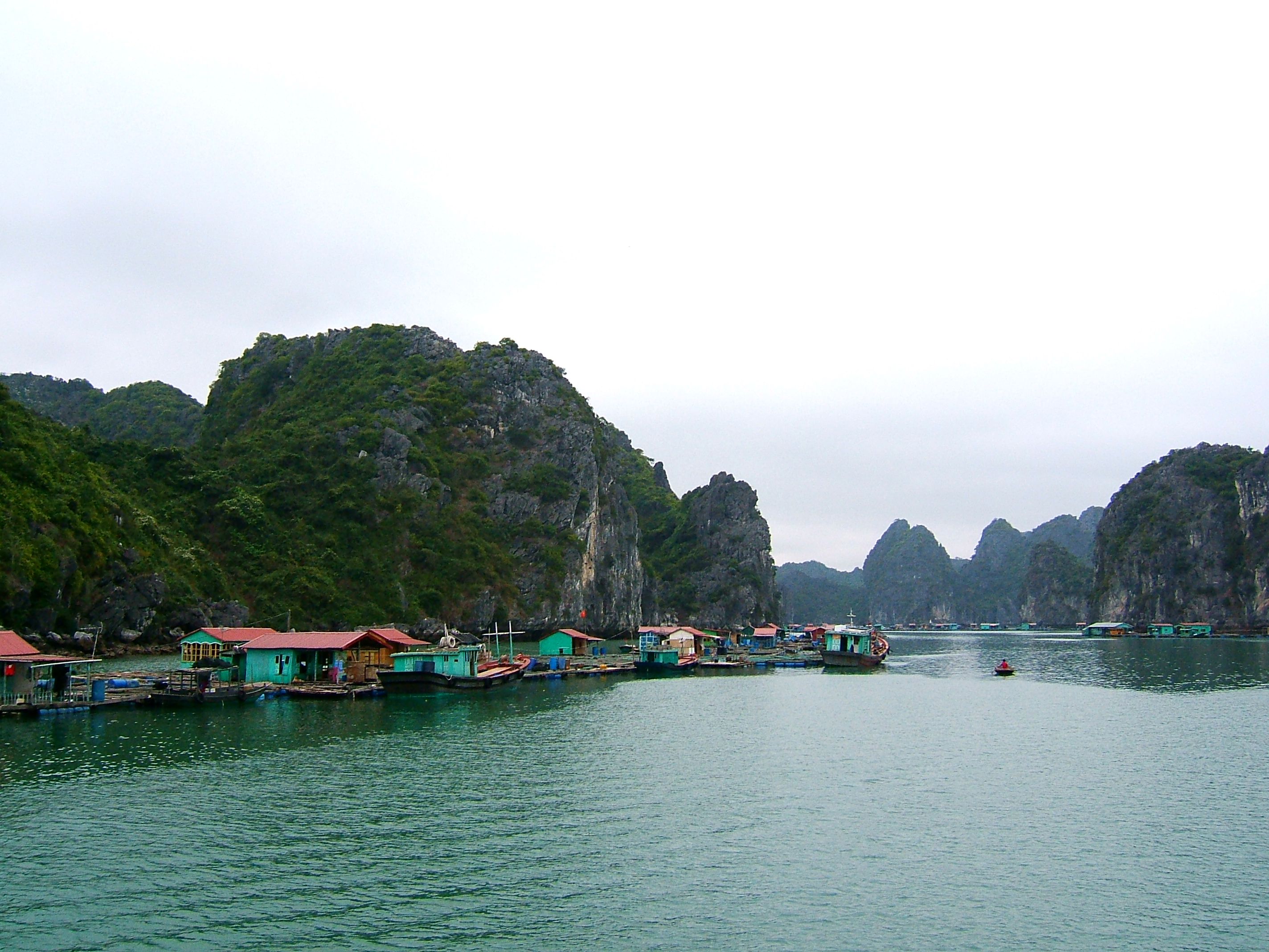 Lan Ha bay (Vịnh Lan Hạ)